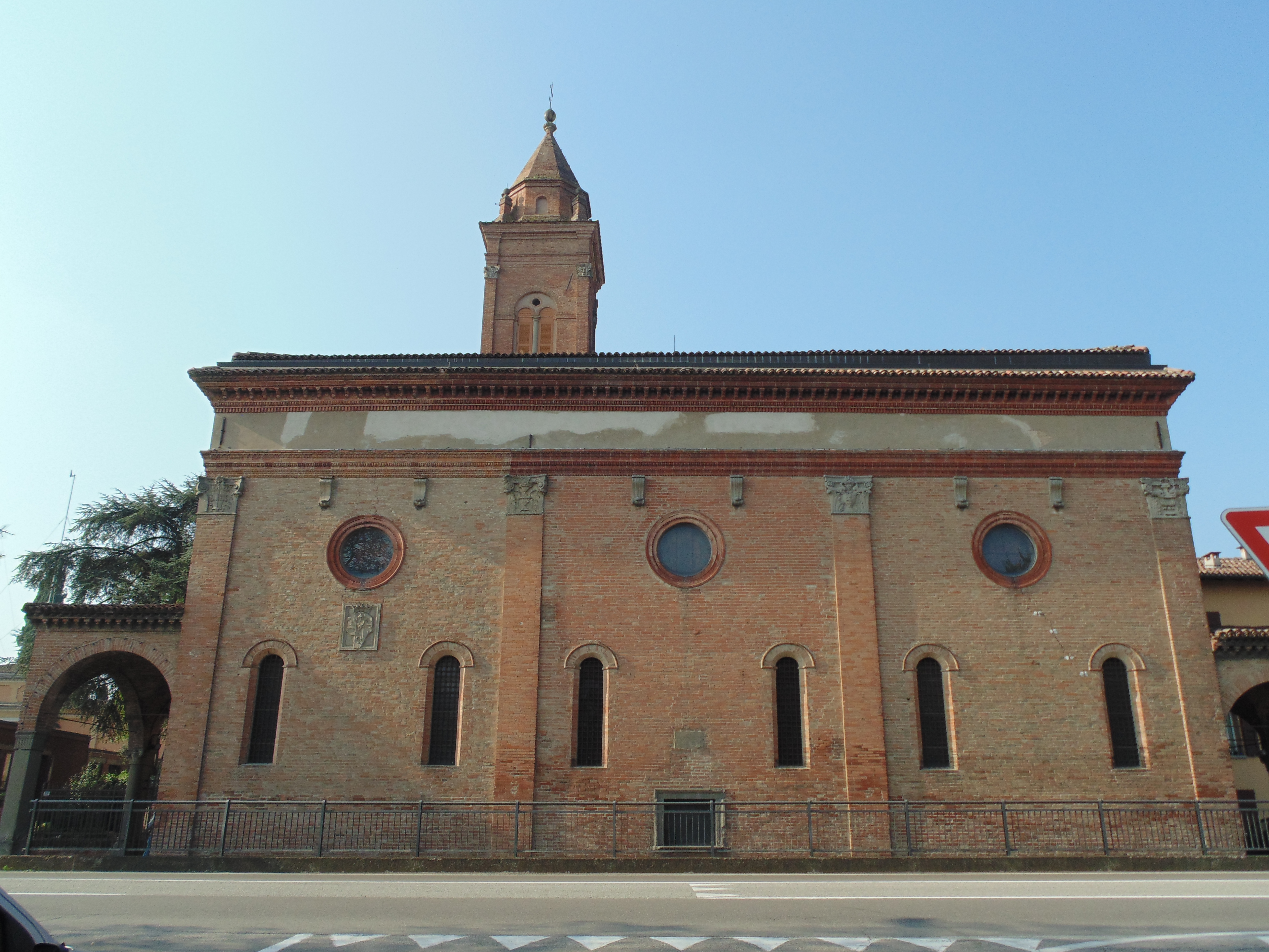 Chiesa di Santa Maria del Piratello - MIBAC This is a photo of a monument which is part of cultural heritage of Italy.